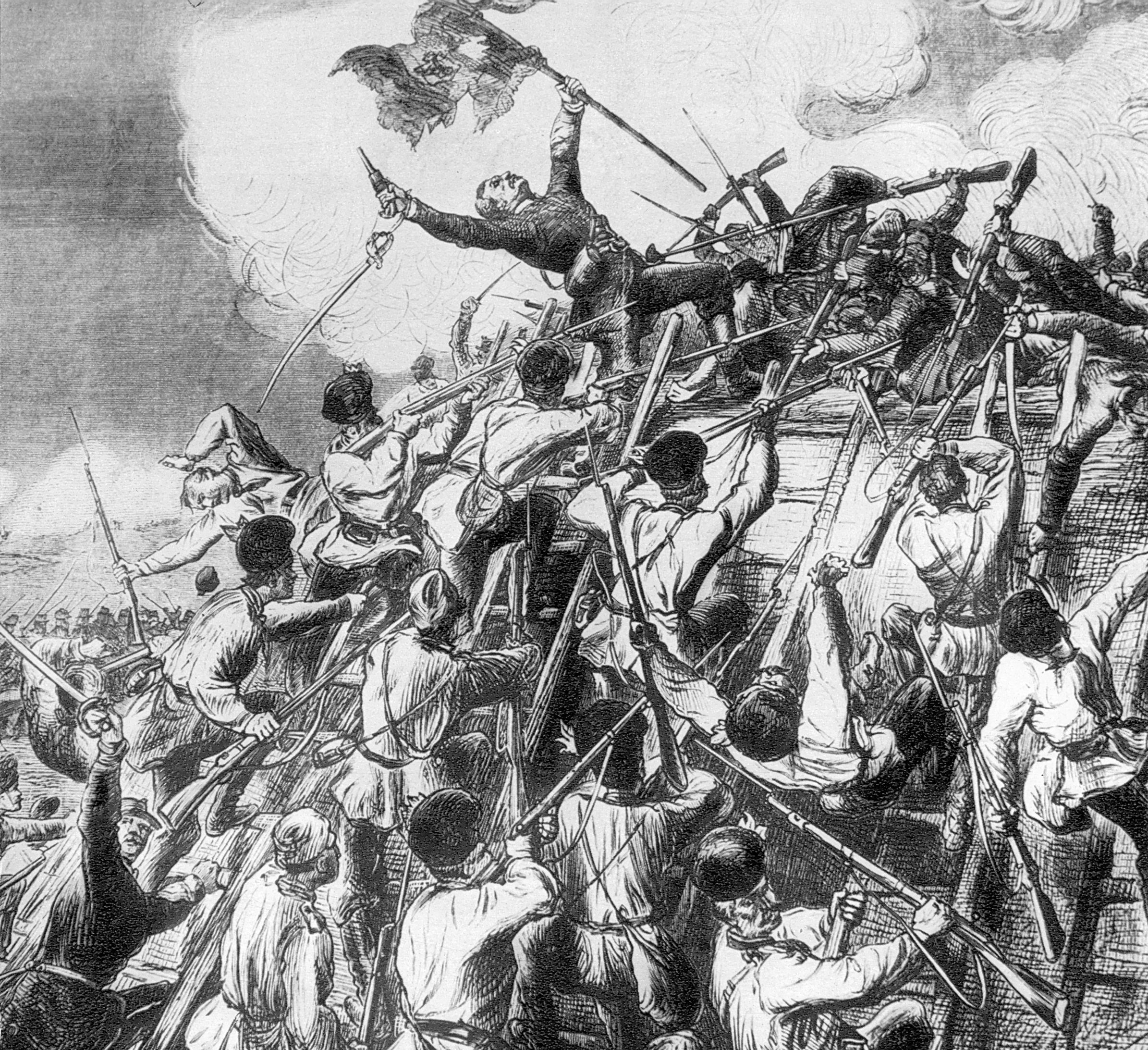 Conquering Grivitsa.